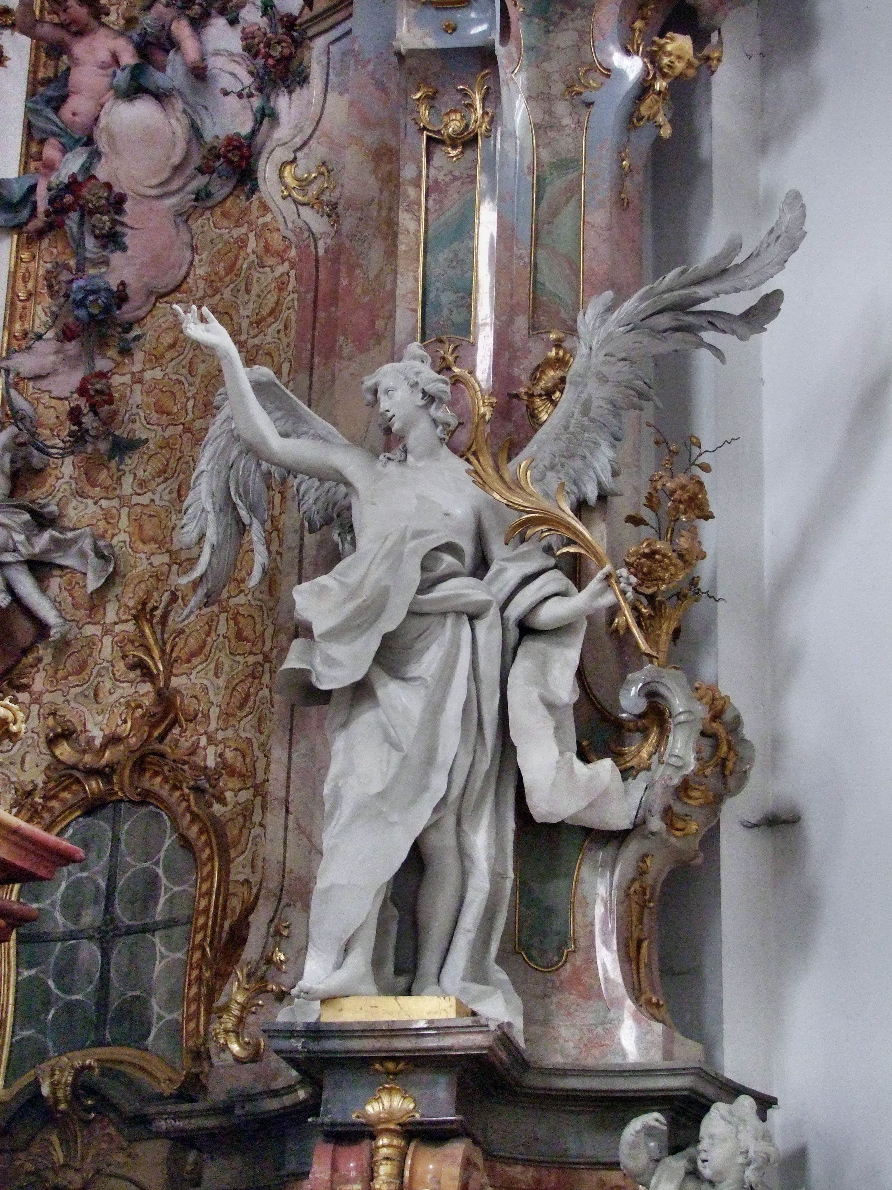 Altarfigur des Altares in der zweiten Seitenkapelle (von Norden) des westlichen Seitenschiffes (F45), Basilika Ottobeuren